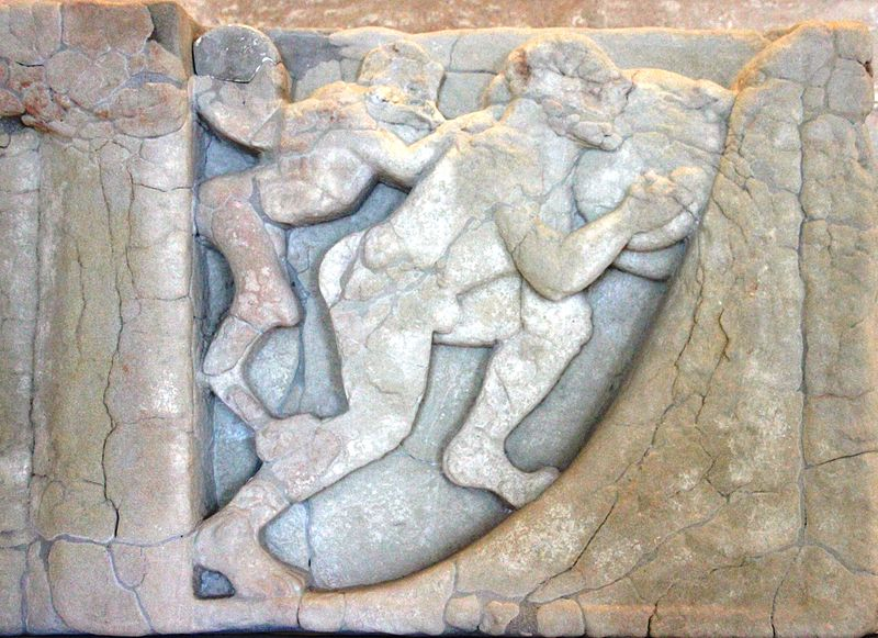 Sisifo spinge il masso su per la montagna. Il demone alato alle spalle di Sisifo rende più dura la punizione del re di Èfira. (VI secolo a.C.) dal santuario di Hera al Sele. Conservato al Museo archeologico di Paestum.